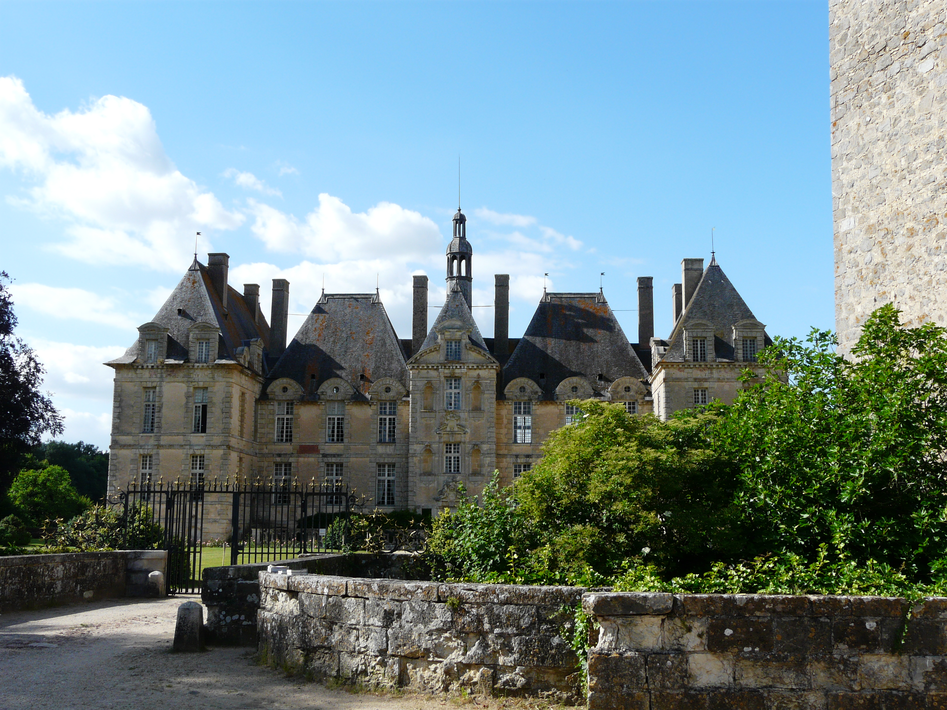 Le château de Saint-Loup-sur-Thouet, Saint-Loup-Lamairé, Deux-Sèvres, France